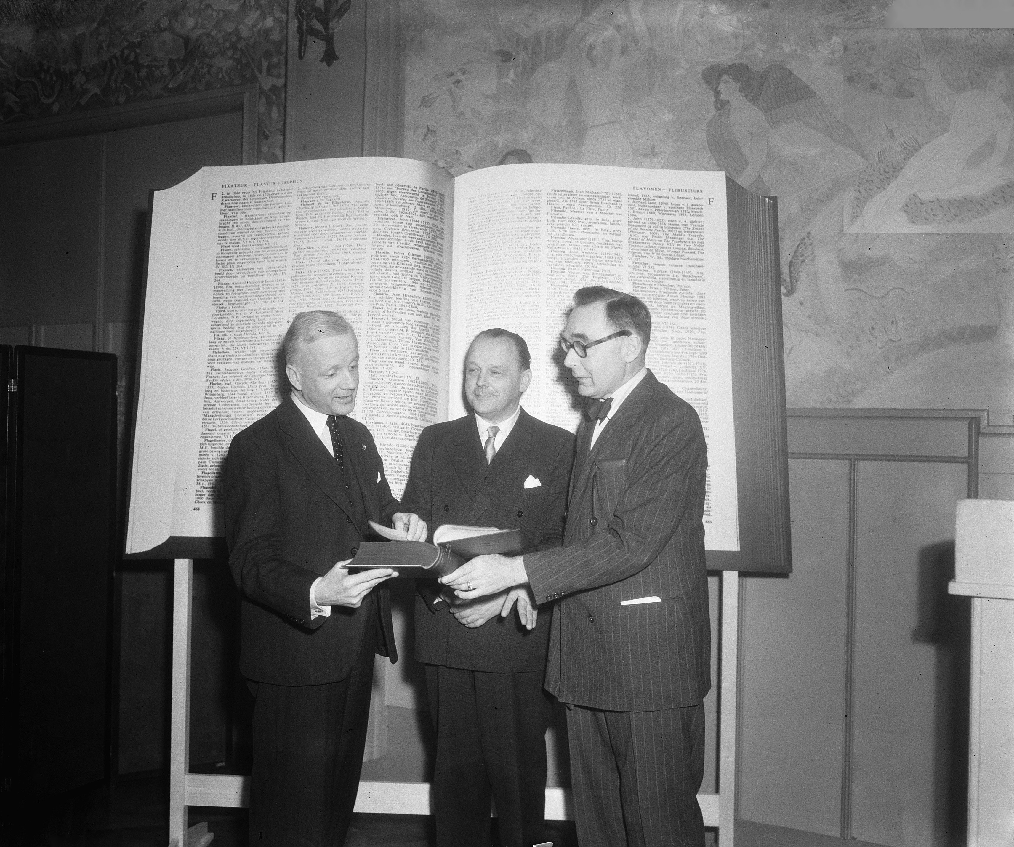 Collectie / Archief : Fotocollectie Anefo Reportage / Serie : [ onbekend ] Beschrijving : Encyclopedie ENSIE. Uitreiking aan de burgemeester van Amsterdam d'Ailly Annotatie : De Eerste Nederlandse Systematisch Ingerichte Encyclopaedie (ENSIE), is een Nederlandstalige encyclopedie in twaalf delen die verschenen tussen 1946 en 1960. De ENSIE stond onder redactie van Hendrik Pos, Jan Romein, Hendrik Kramers, Oene Noordenbos, Siegfried Thomas Bok en anderen. De typografie was in handen van Jan van Krimpen. Datum : 4 maart 1952 Locatie : Amsterdam, Noord-Holland Trefwoorden : burgemeesters, encyclopedieën Persoonsnaam : Ailly, A.J. d' Fotograaf : Duinen, […] van / Anefo Auteursrechthebbende : Nationaal Archief Materiaalsoort : Glasnegatief Nummer archiefinventaris : bekijk toegang 2.24.01.09 Bestanddeelnummer : 904-9944